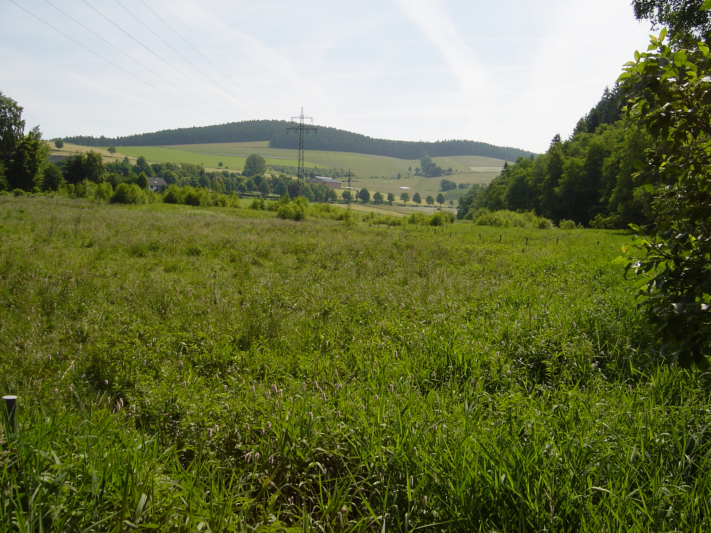 Mittlerer Teil vom Naturschutzgebiet Hillenbachtal (Grünland im Vordergrund) im Eigentum der NRW-Stiftung.